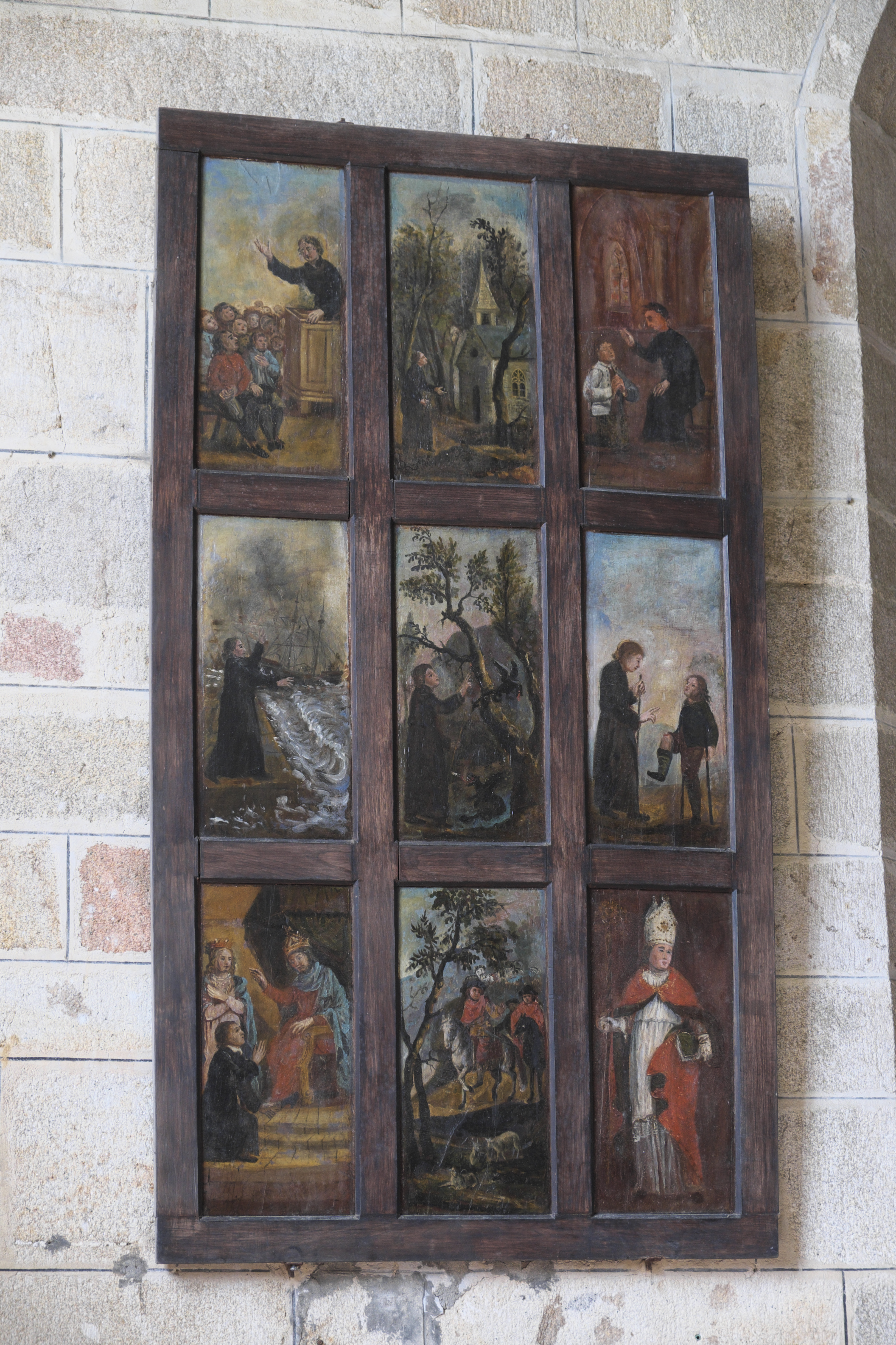 Katholische Pfarrkirche Saint-Thurien in Plogonnec im Département Finistère (Region Bretagne/Frankreich)